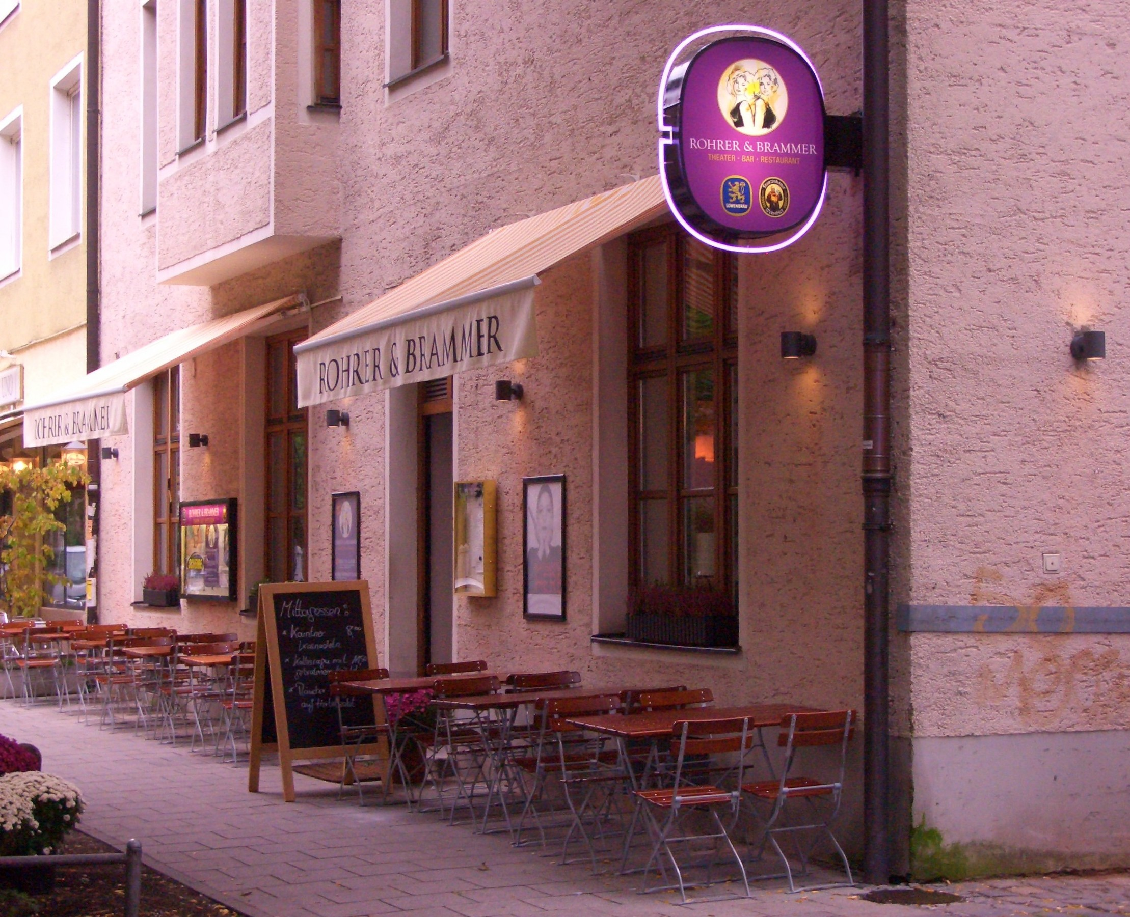 Theater Rohrer & Brammer in München-Schwabing - Eingang zum Lokal